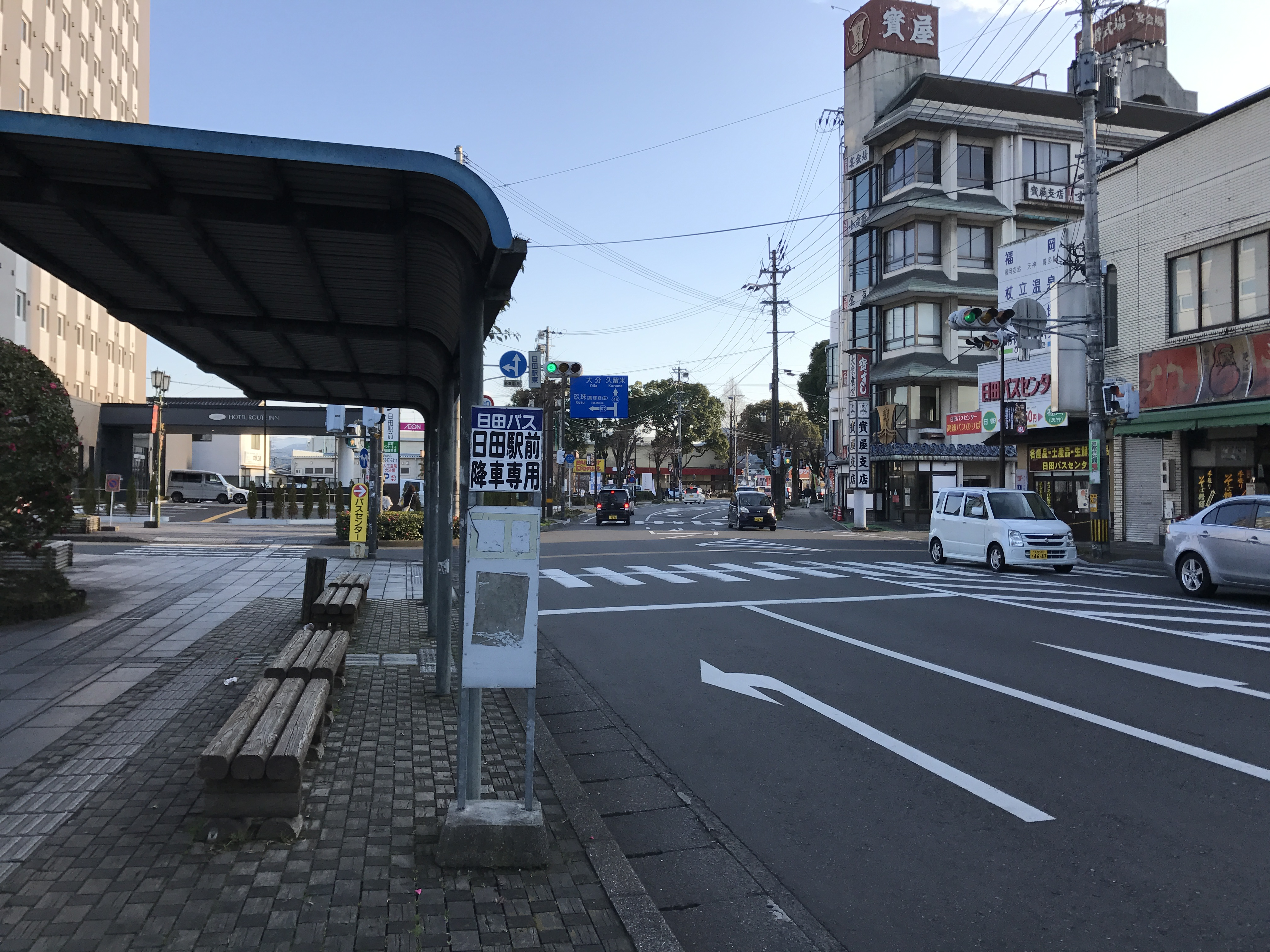 日田駅前の様子